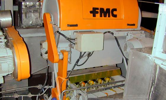 Industrielle Zitruspresse für die Saftproduktion